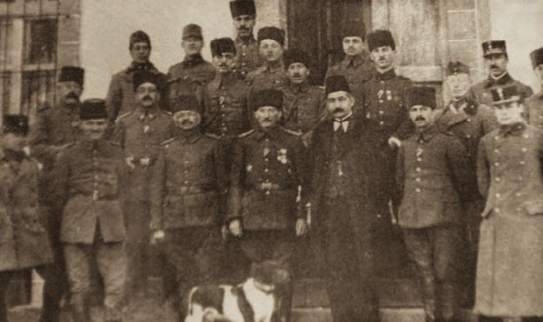 2’nci Ordu Komutanı Mustafa Kemal Paşa, Diyarbakır, 1917